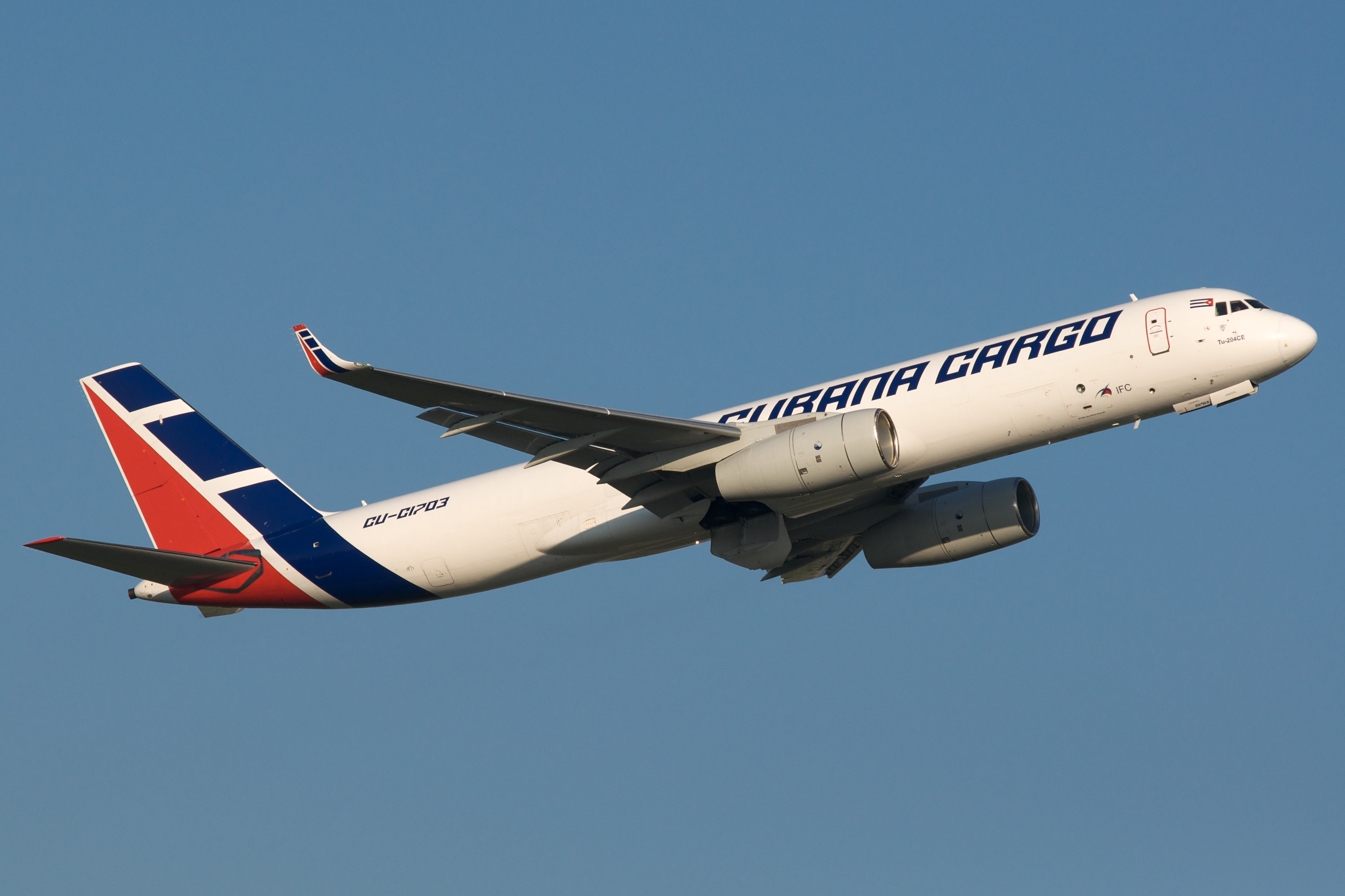 Cubana Cargo Tu-204 CU-C1703